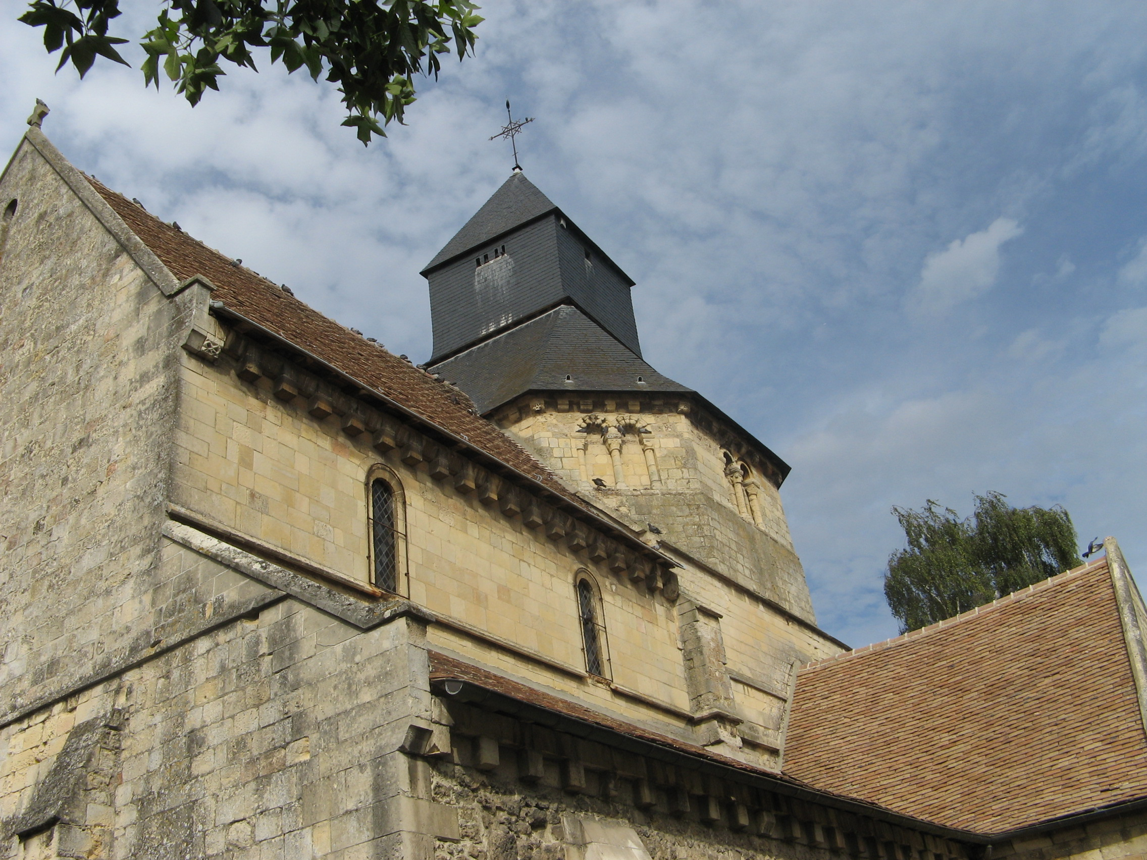 Touques : église Saint-Pierre. XIe siècle.